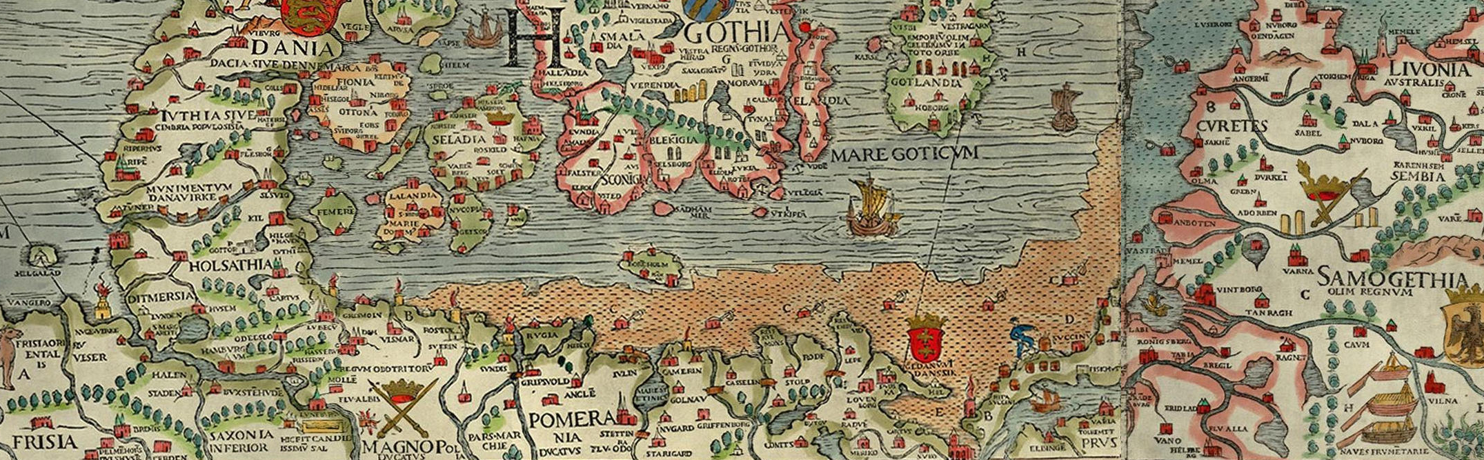 Feuerblüsen auf Neuwerk und der Ostsee im 16. Jahrhundert